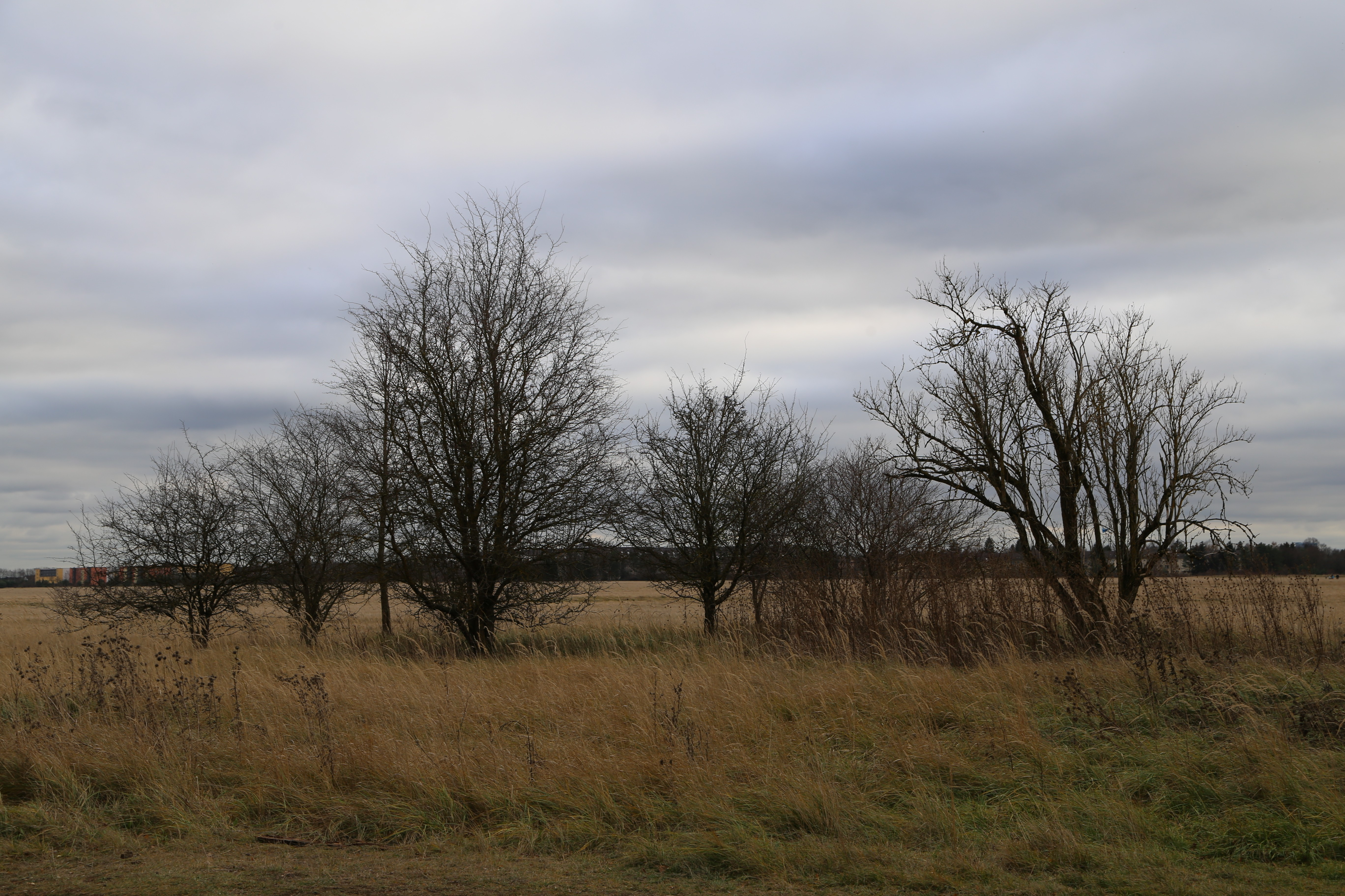 Panzerwiese, Naturschutzgebiet Panzerwiese und Hartelholz, München-Hasenbergl